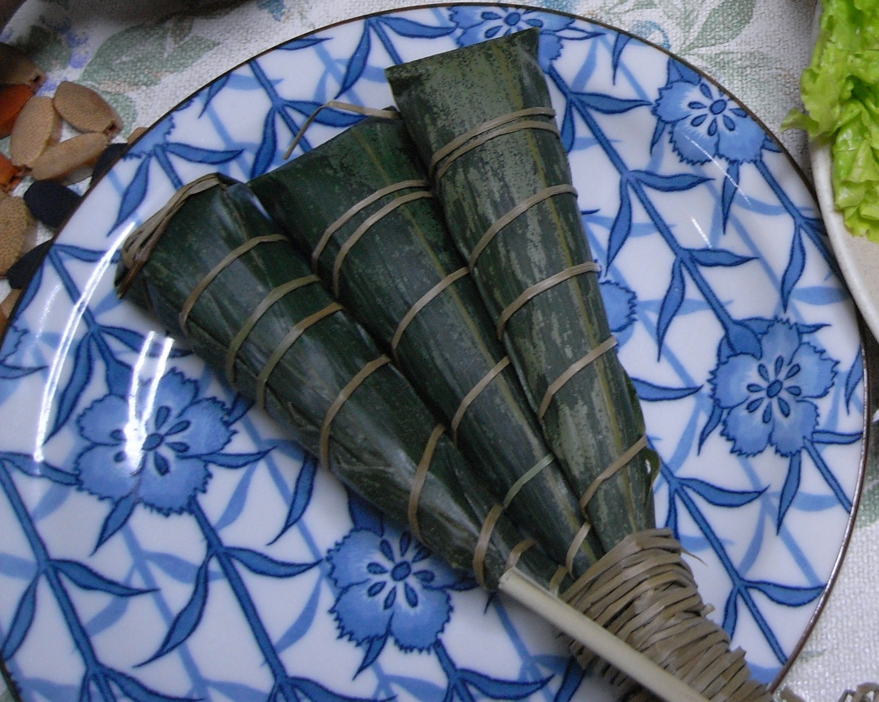 中文（香港）: 端午のちまき